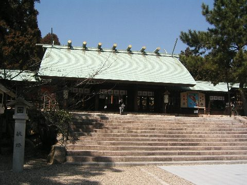 2004年(平成16年)3月10日に投稿者が撮影したものです。Stanislaus 2005年3月28日 (月) 12:39 (UTC)